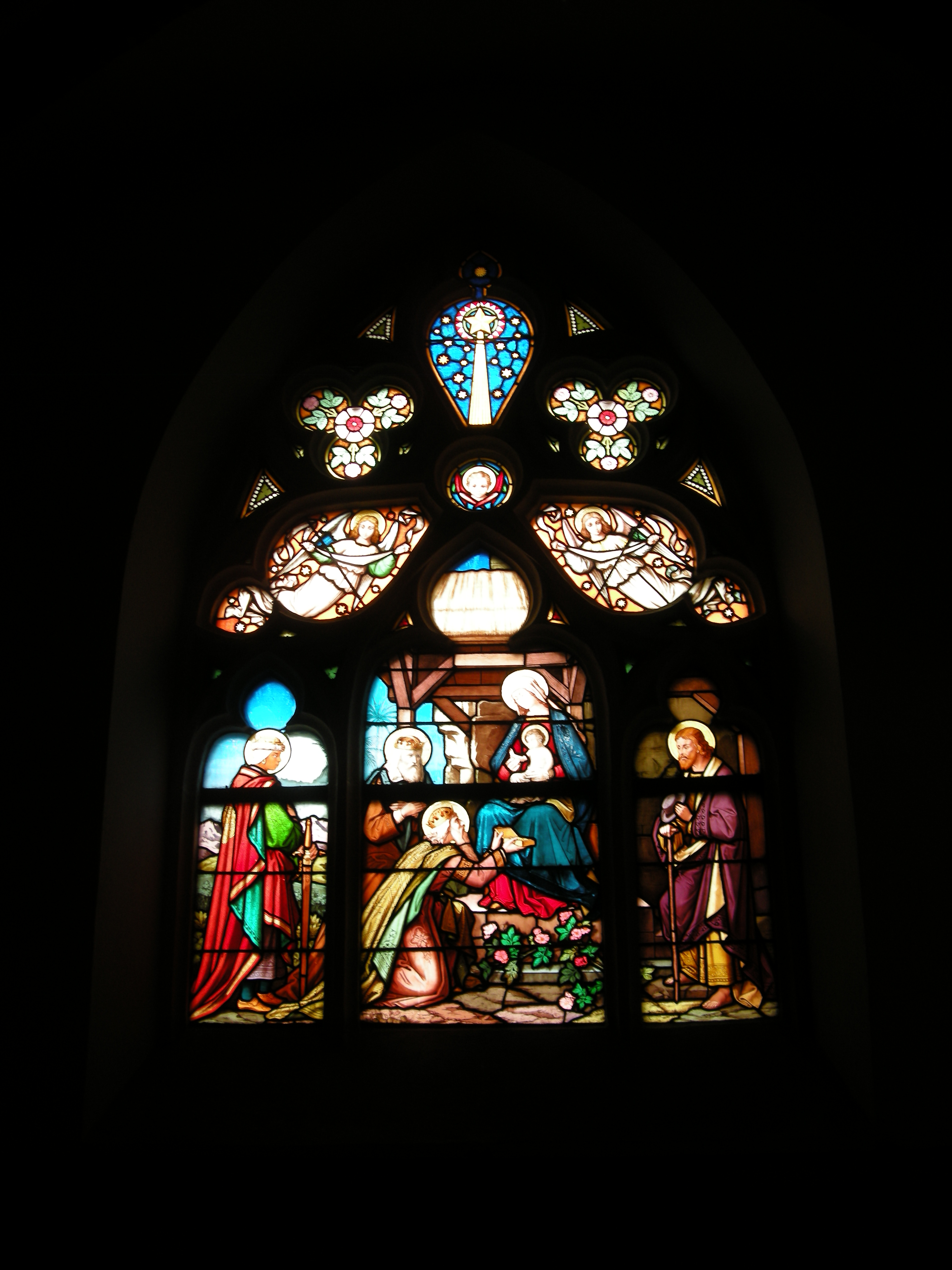 Witraż w przedsionku południowym